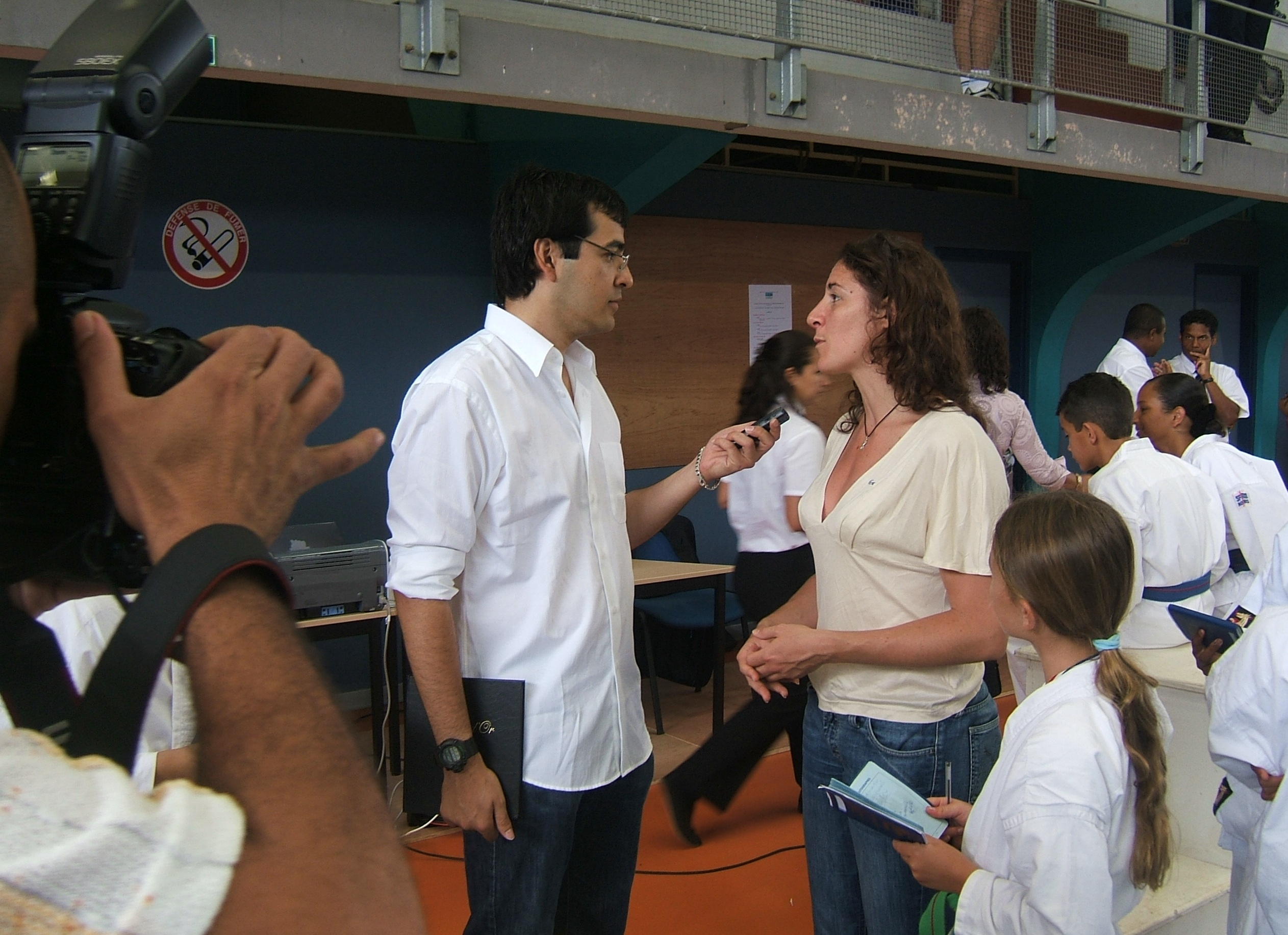 La karatéka française Laurence Fischer interrogée par un journaliste à Bras-Panon, sur l'île de la Réunion